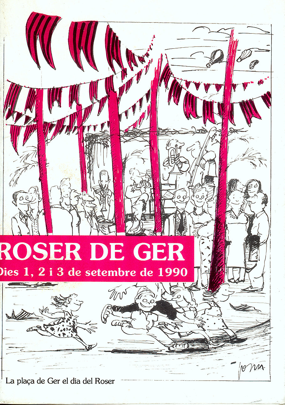 Plaça Major de Ger el dia del Roser